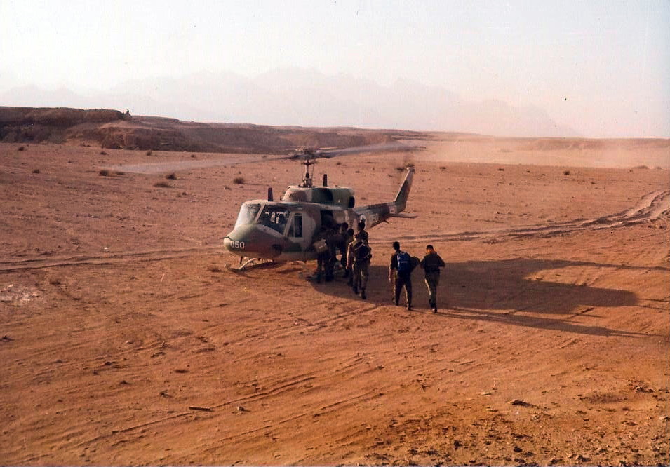 מסוק אנפה מפנה אורחים על רקע המדבר הסעודי